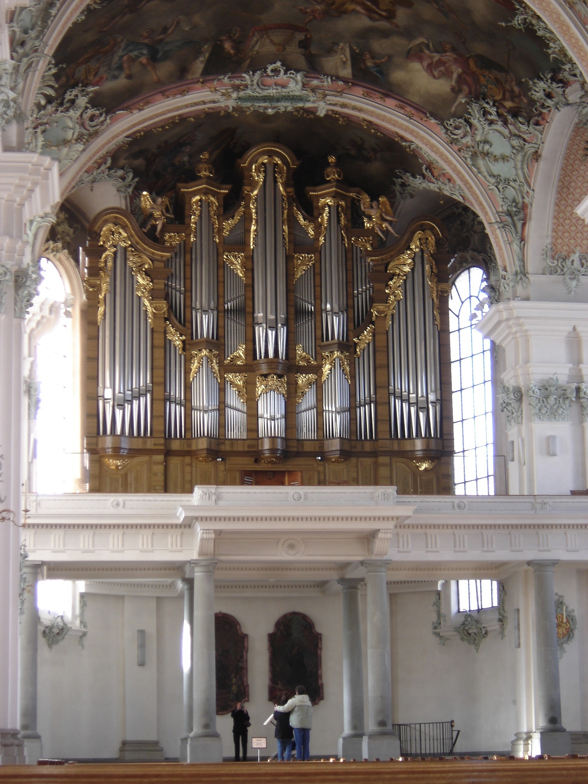 Orgues de la cathédrale de Saint-Gall